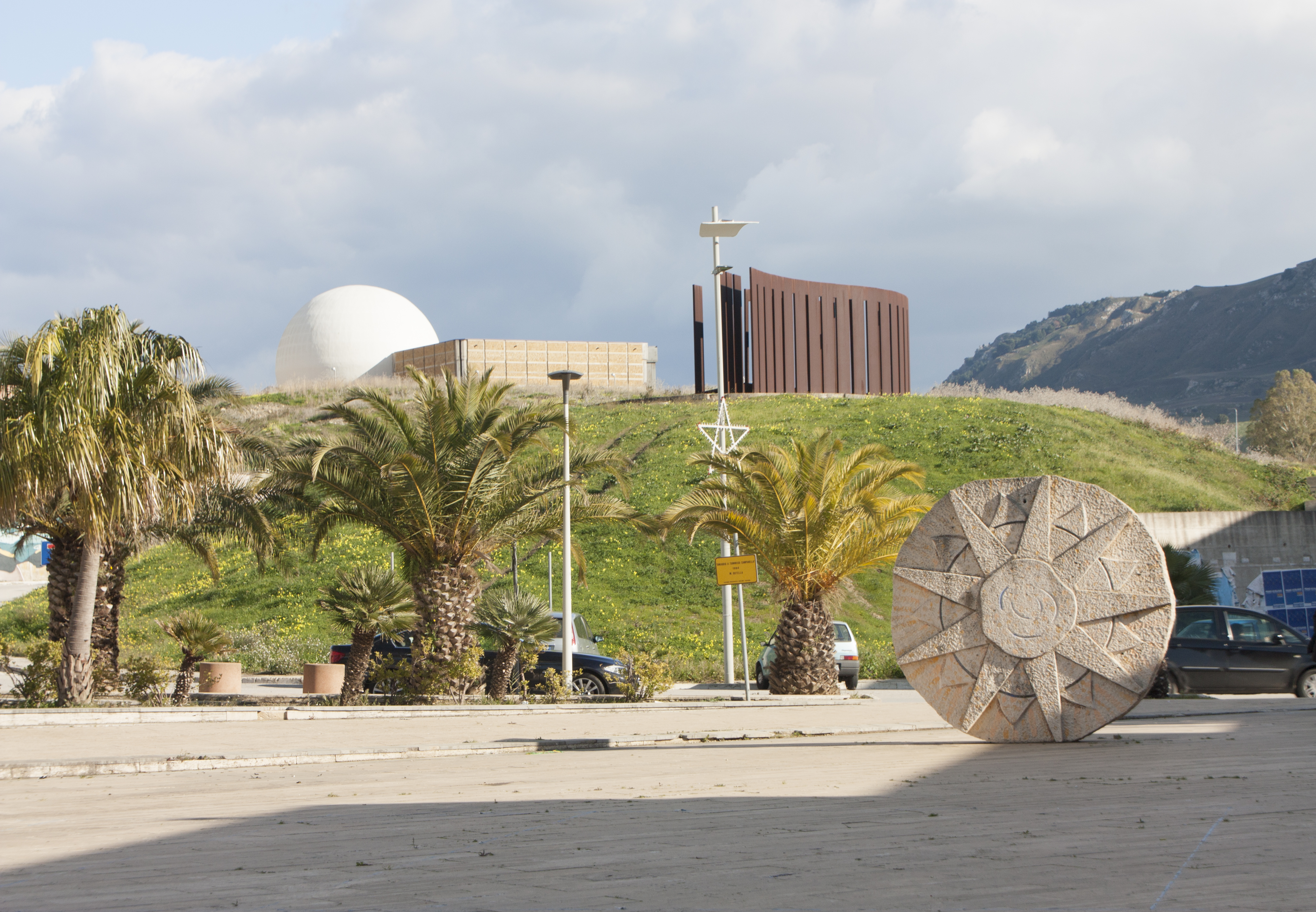 Omaggio a Campanella (in primo piano) Sequenze, Fausto Melotti (in alto)